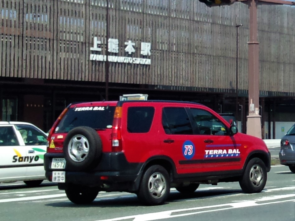 寺原自動車学校で長らく使用されているホンダ・CR-Vの教習車